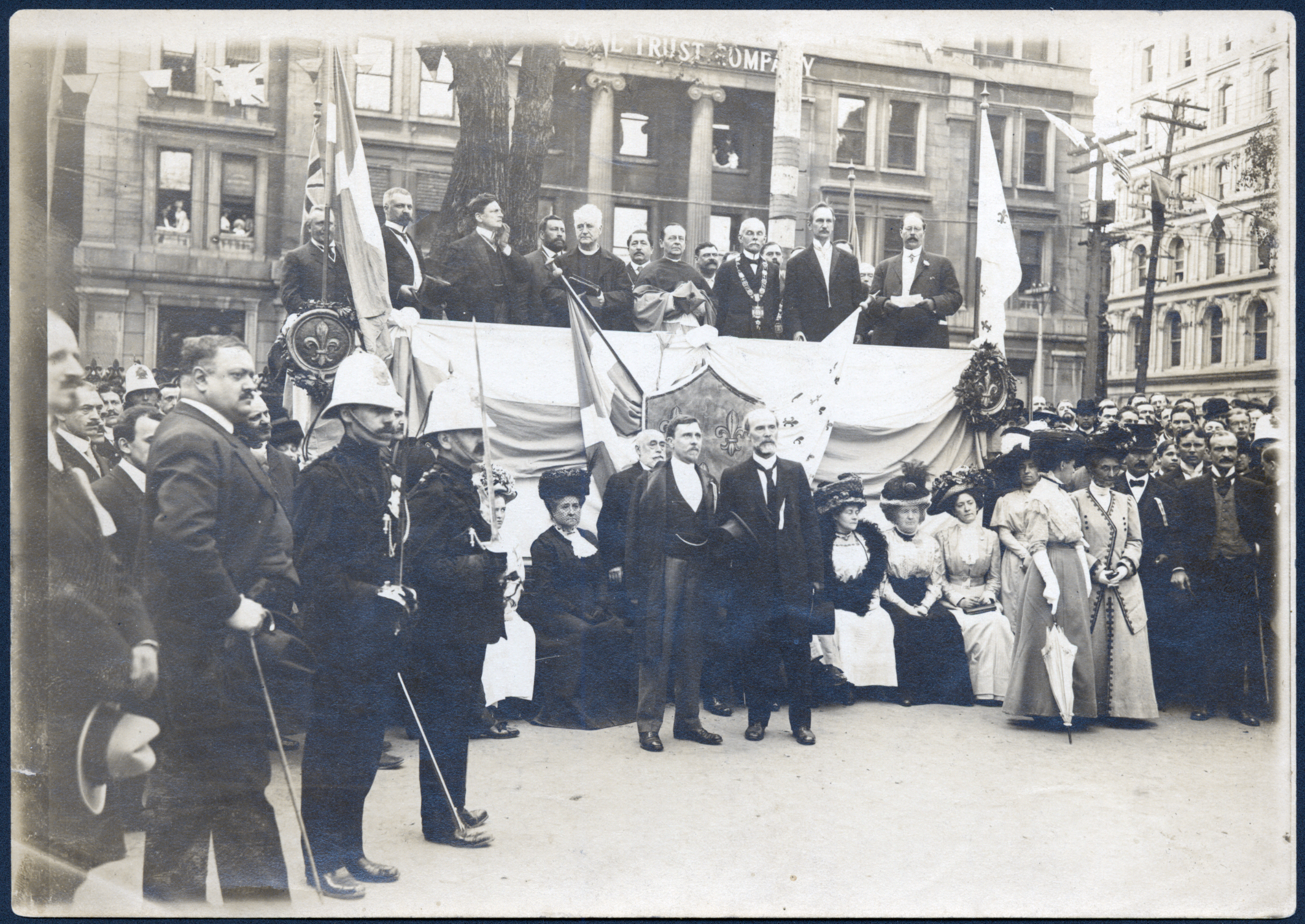 Jean-Baptiste Lagacé, Henri Bourassa et autres individus non identifiés dans le cadre d'un défilé (ou de son organisation) de la Saint-Jean entre 1925 et 1934.